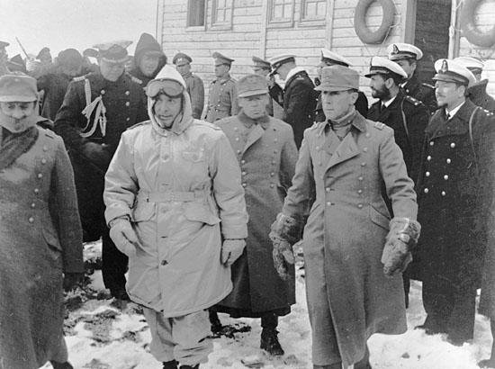 Gabriel González Videla. Presidente de Chile (1946-1952). Fotografía Fotografía durante la inauguración de la Base General Bernardo O'Higgins en la Antártica, el 18 de febrero de 1948.